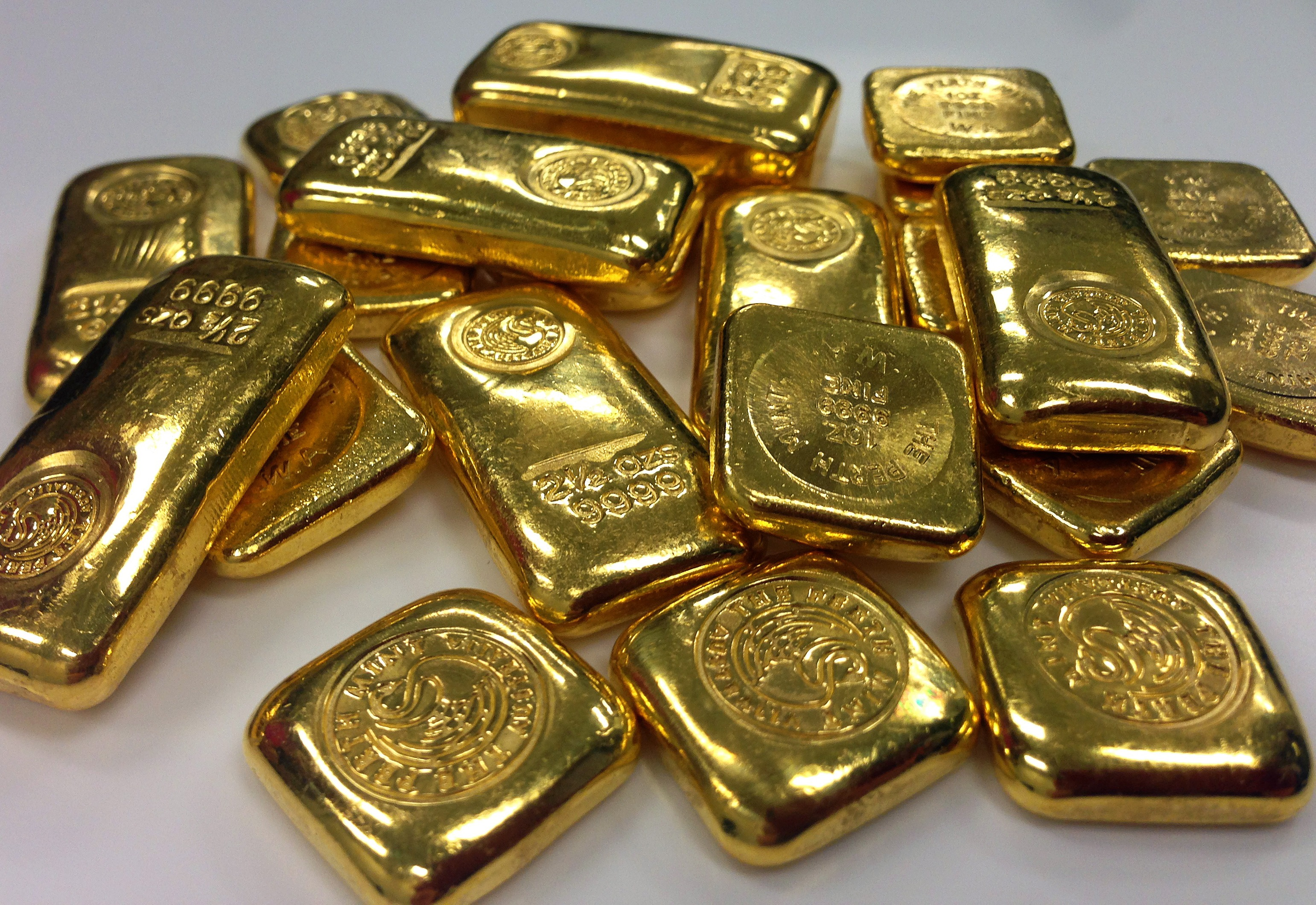 sztabki złota English | Polski | +/−